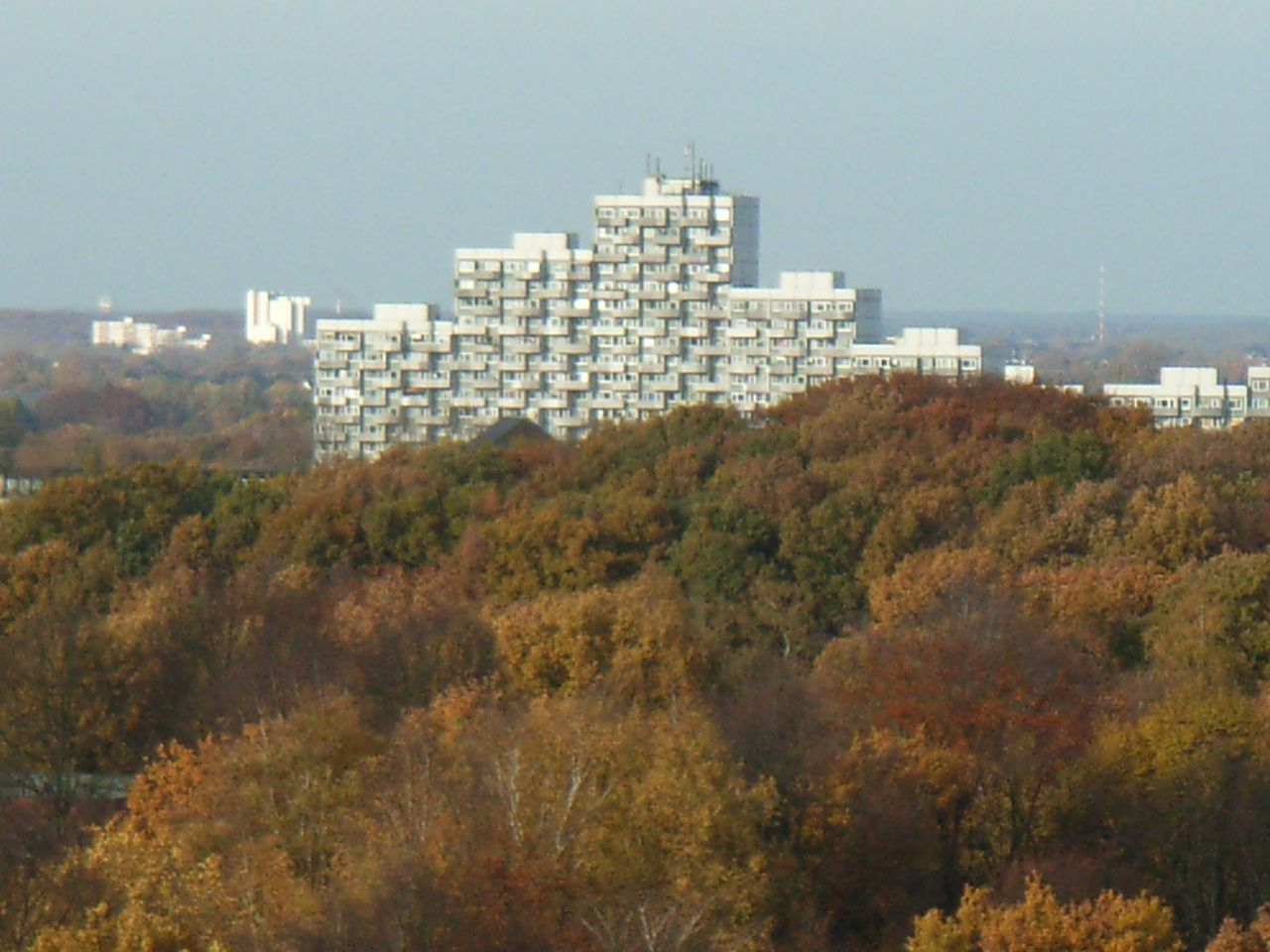 Skyline vom Osdorfer Born (Aufnahme vom Hochhaus Julius-Brecht-Str.)